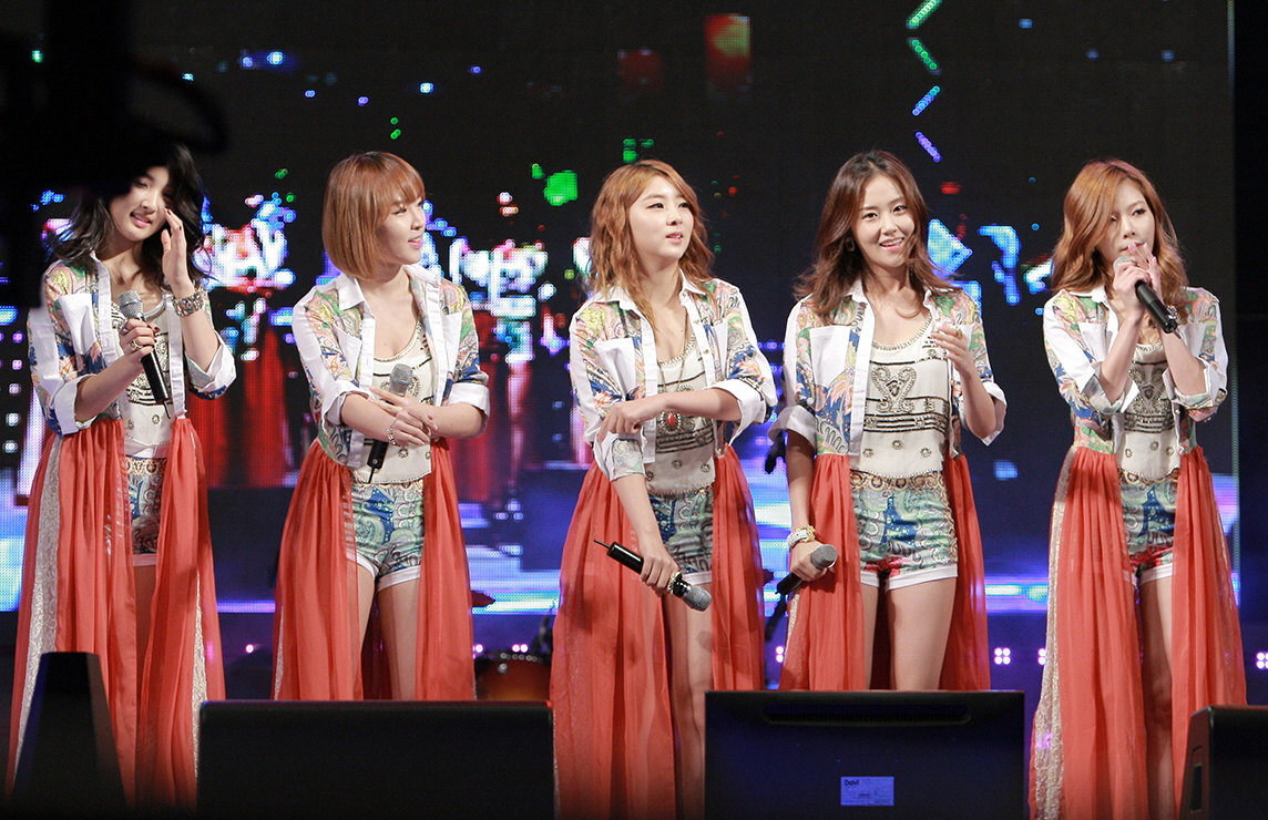 2012. 09. 15. 파주출판단지 파주북소리 2012